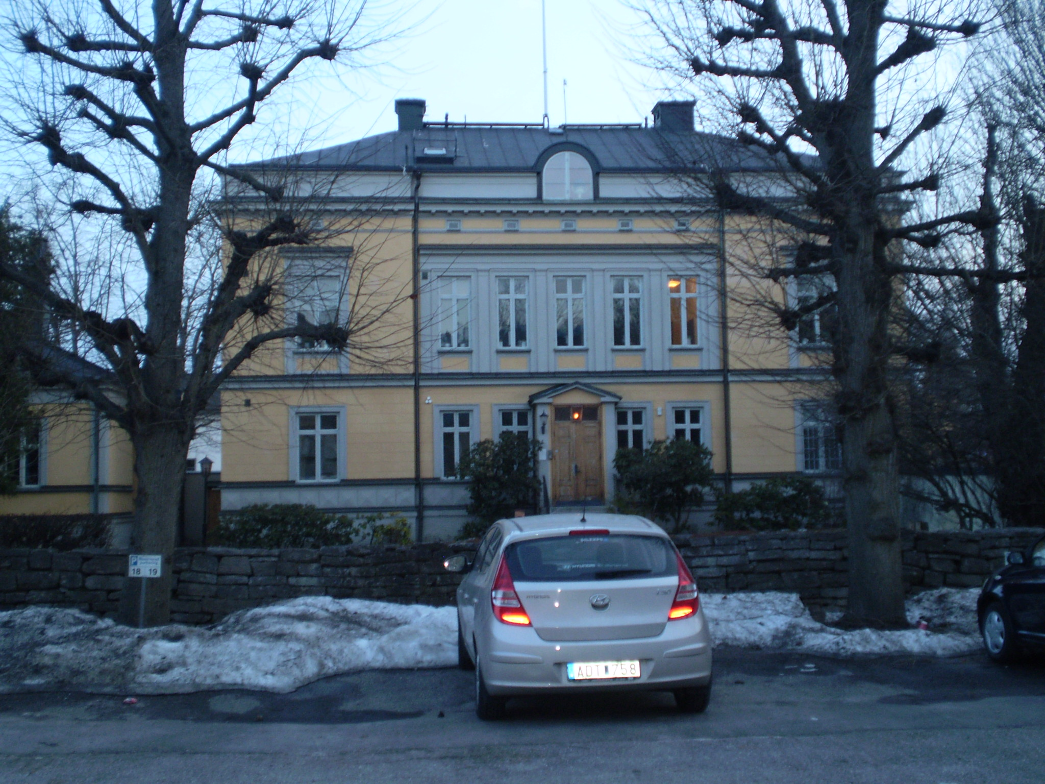 Olaigatan 21 i Örebro. Före detta stabsbyggnad för Livregementets husarer, Livregementets grenadjärer, Örebro försvarsområde och Redovisningsavdelning Bergslagen